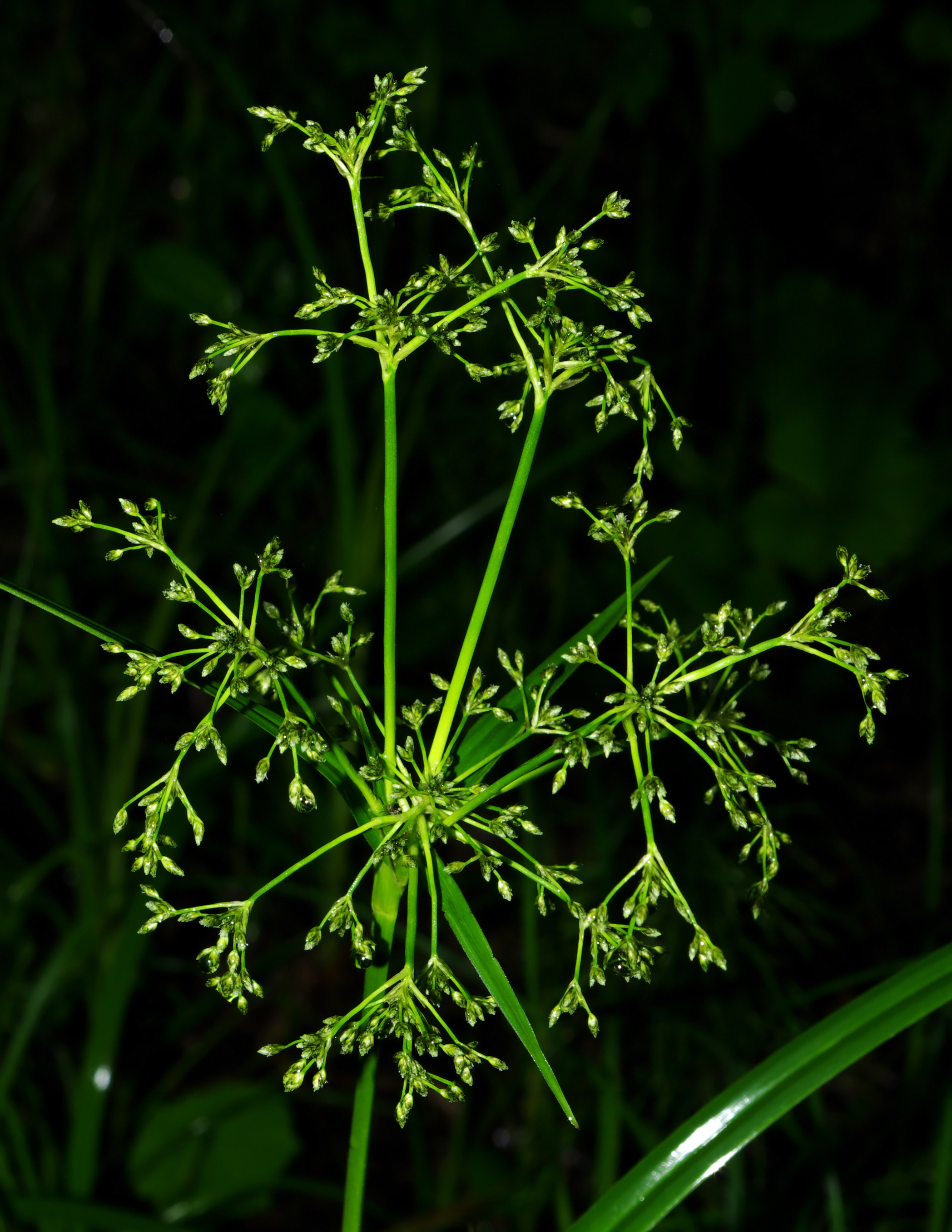 Sitowie leśne (Scirpus sylvaticus) - kwiaty